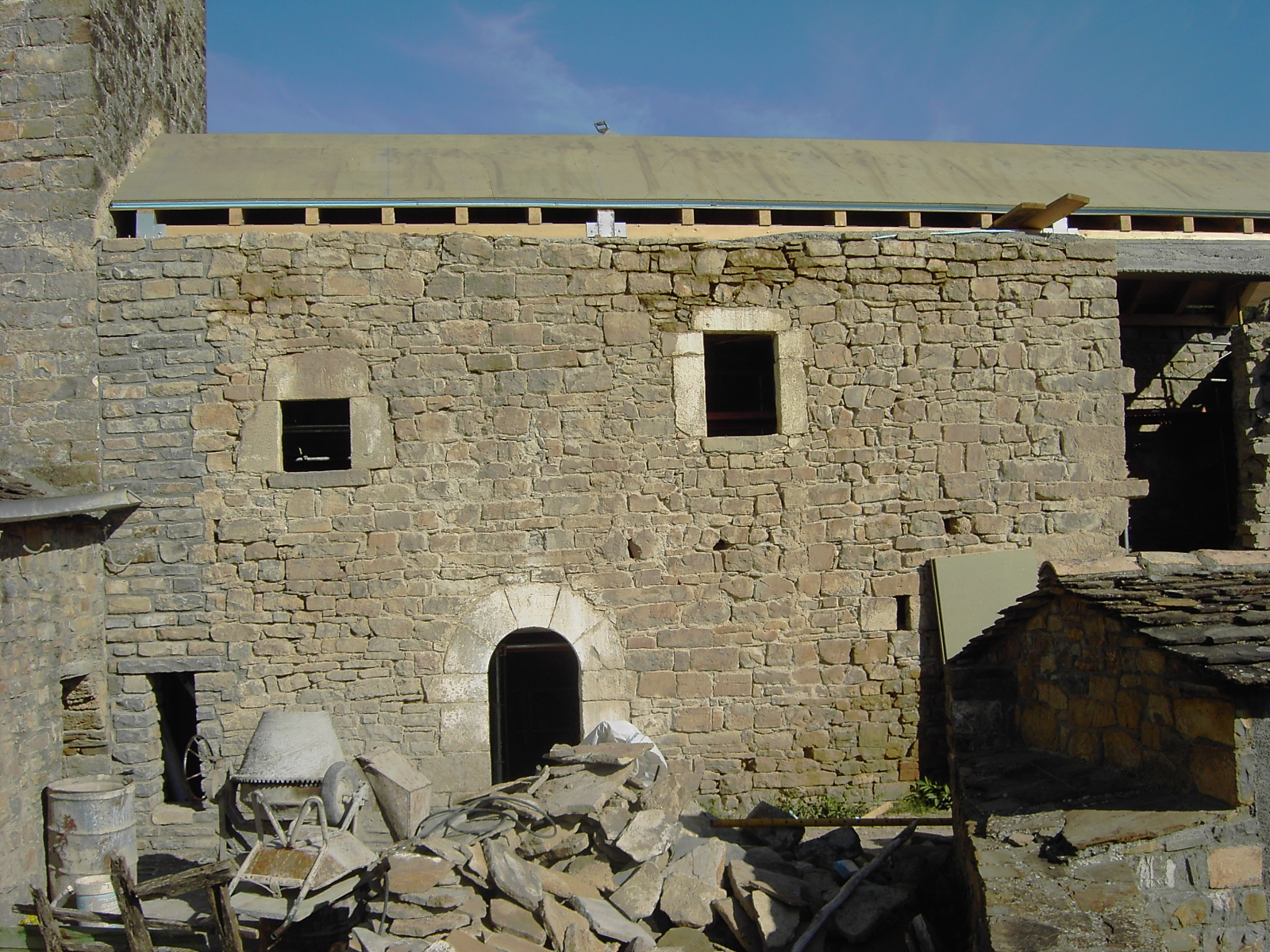 La abadía de San Vicente de Labuerda, actualmente en proceso de restauración gracias a los fondos del proyecto Continua Pirineum de la Unión Europea.